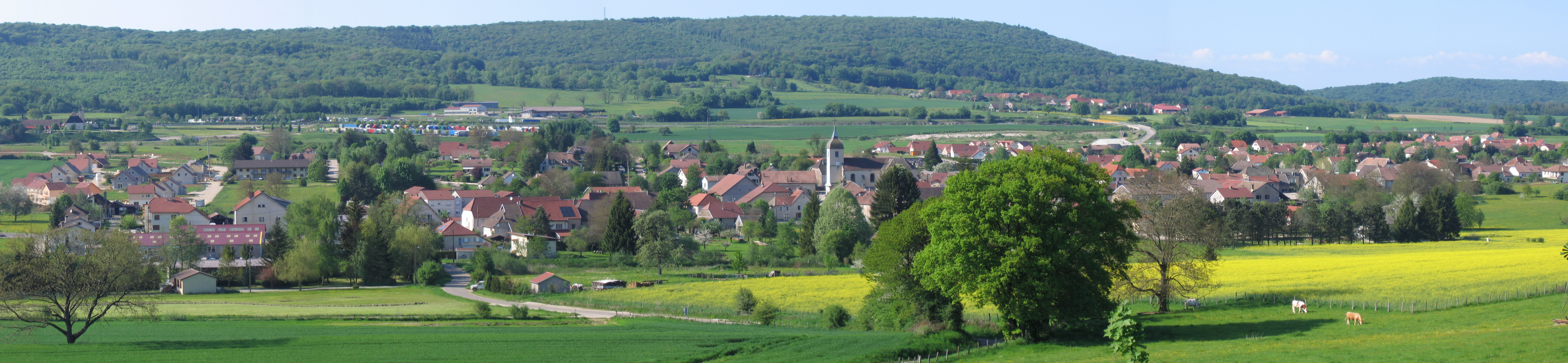 Marchaux